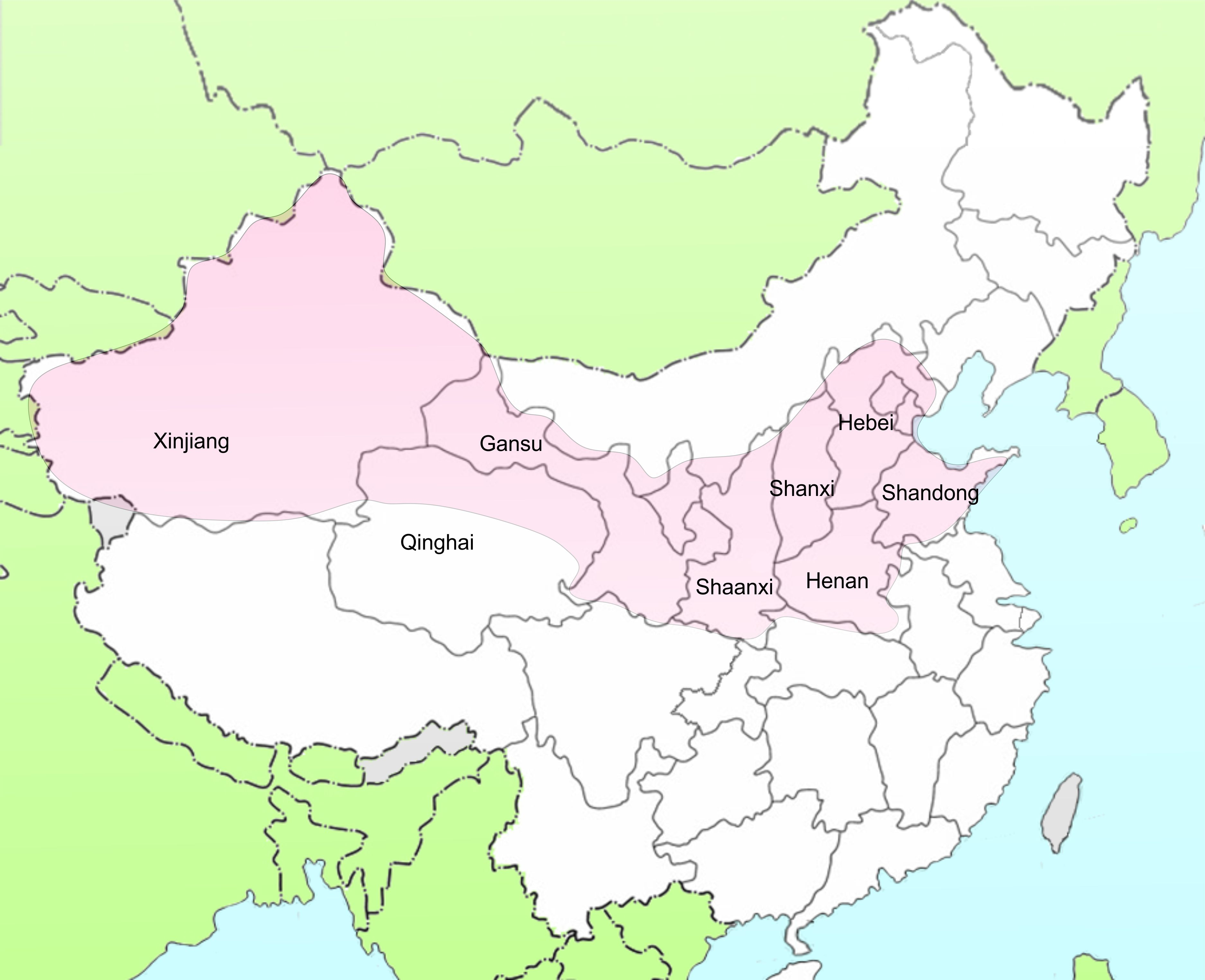 carte